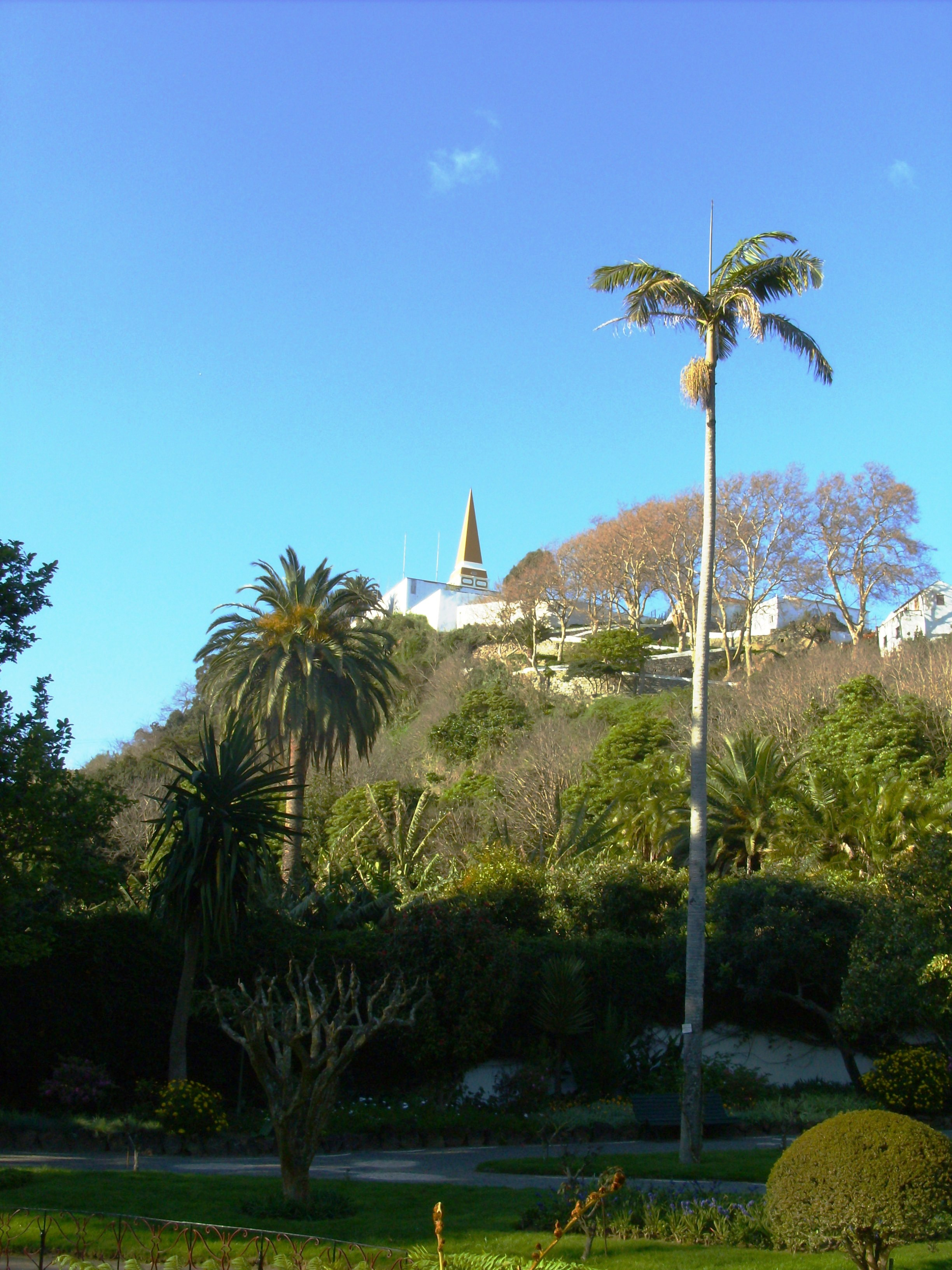 Jardim Duque da Terceira, Angra do Heroísmo, Ilha Terceira, Açores: ao fundo o obelisco no Alto da Memória.